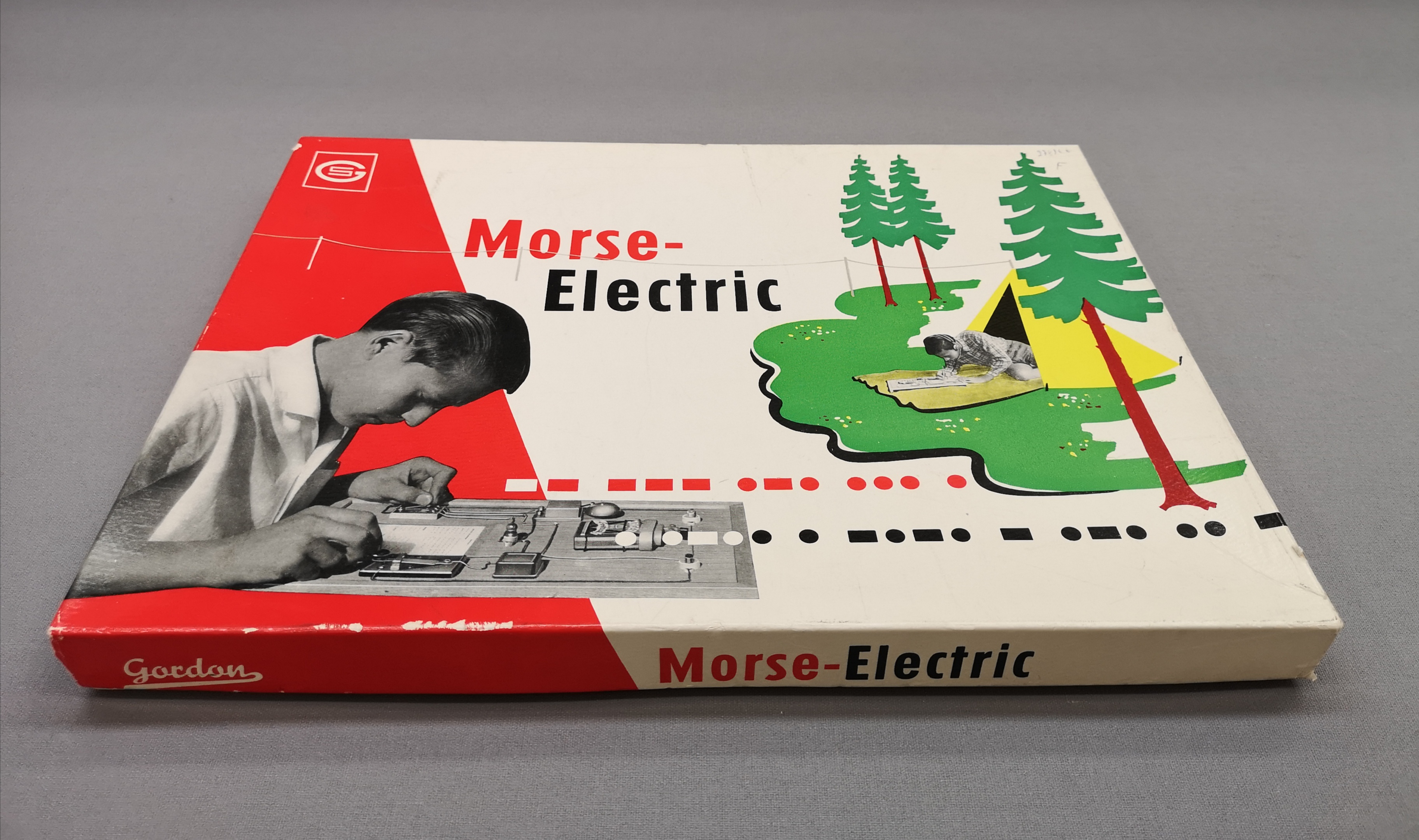 Lernspiel für Jugendliche in der DDR aus der Sammlung der Alltagsgegenstände im Museum Europäischer Kulturen